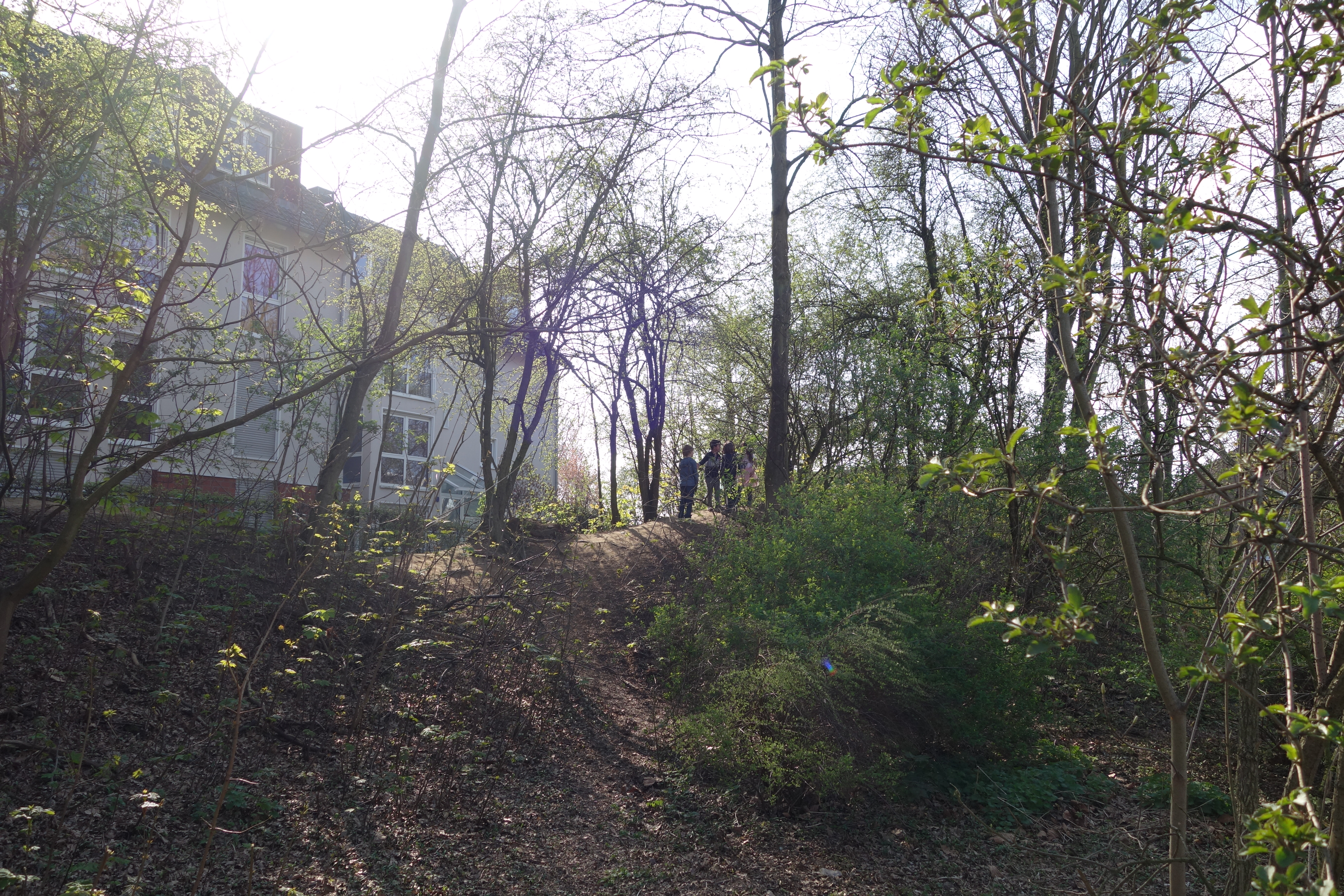 Erdwall, das Fundament der Nordkurve der ehemaligen Radrennbahn Düsseldorf.